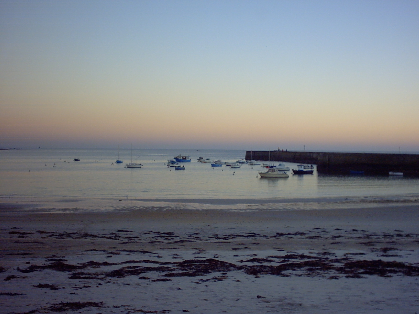 Fin de journée sur le port de Lomener